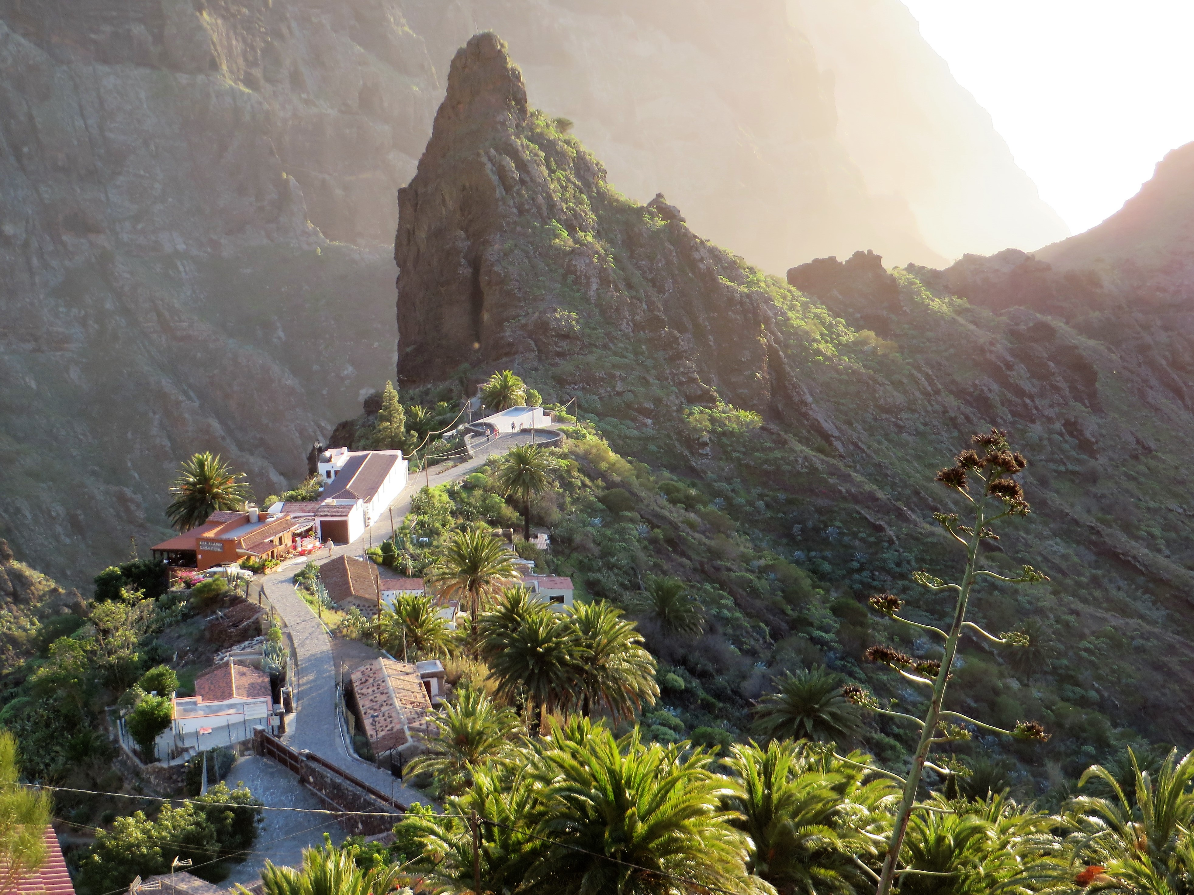 Mascaschlucht (Bildhintergrund) im Januar am Spätnachmittag